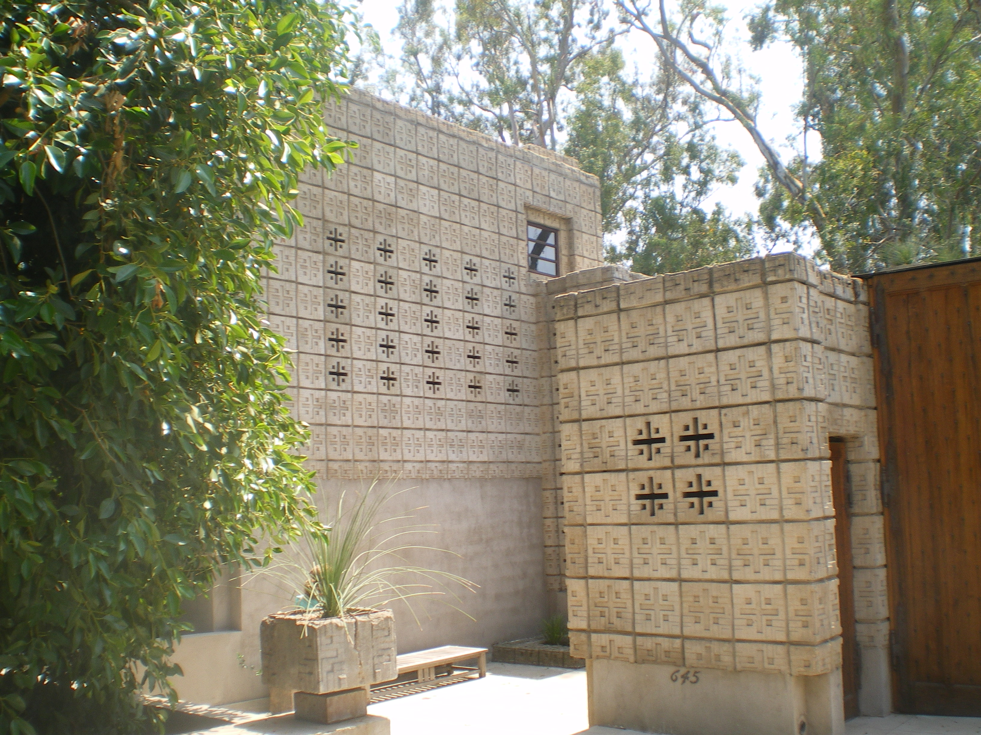 Millard House, aka La Miniatura, Pasadena, California